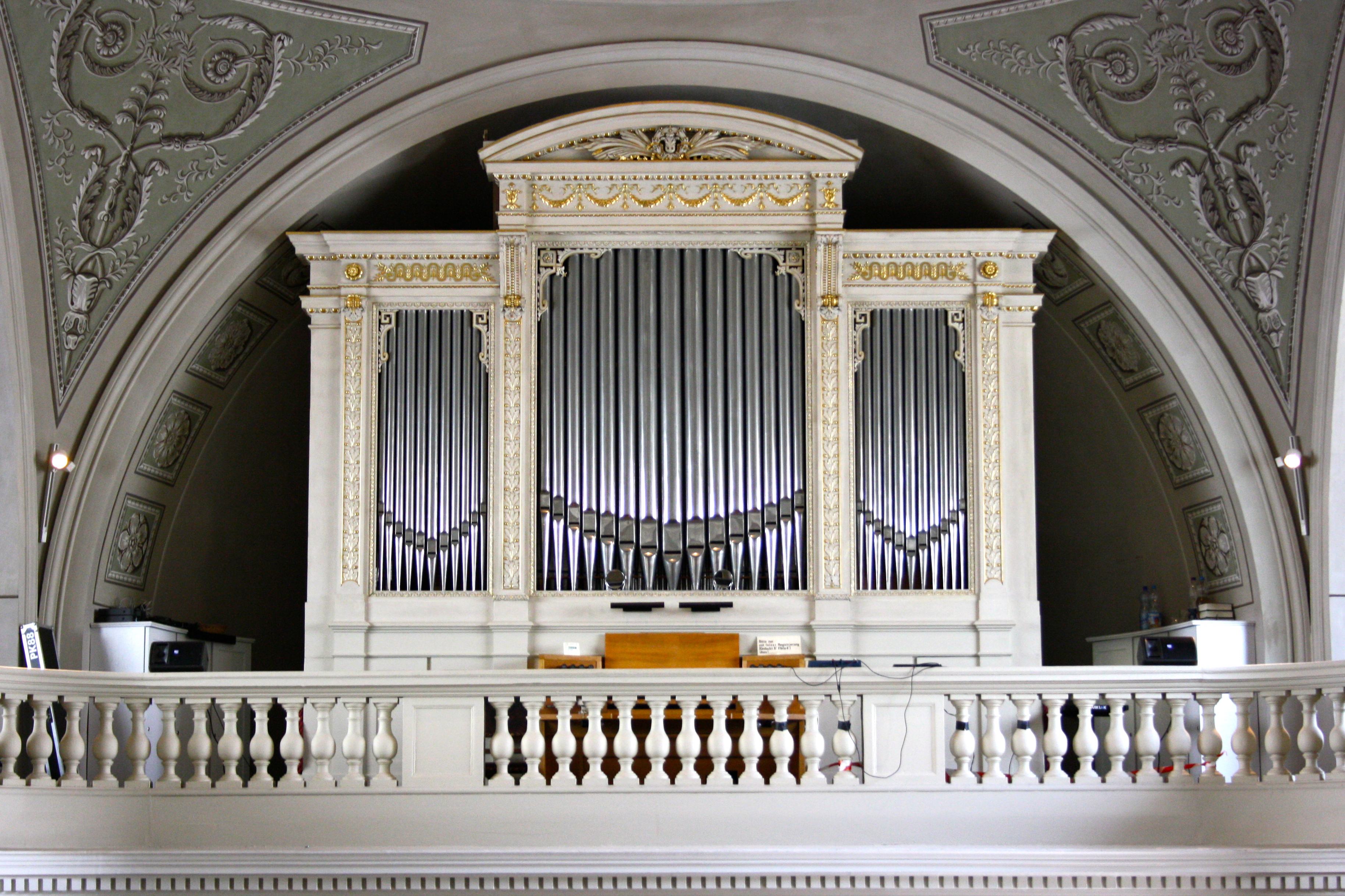 Orgel der Reformierten Stadtkirche in Wien.